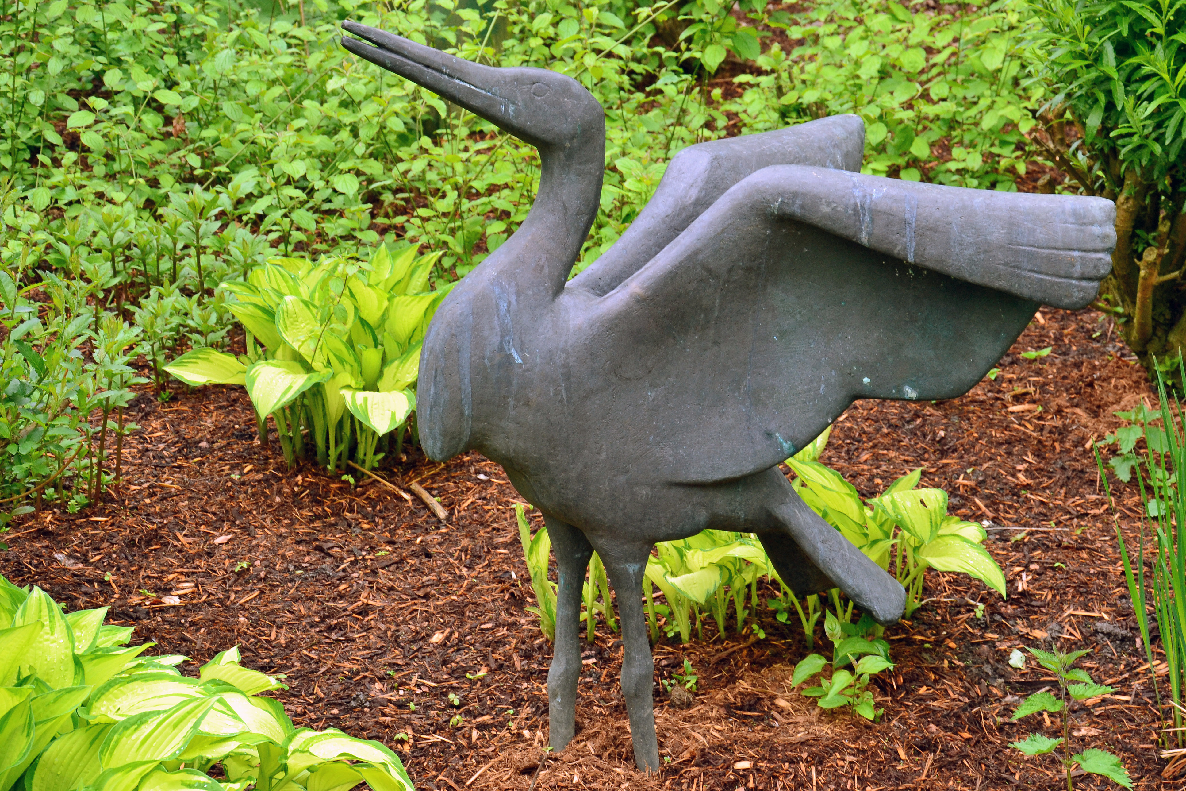 Skulpturen im Grugapark